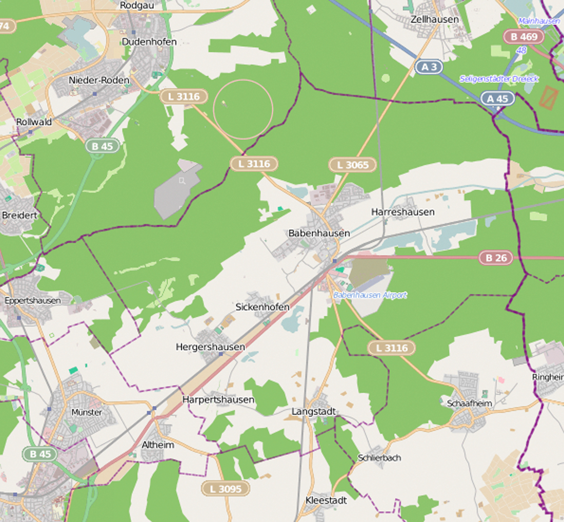 Karte der Ortsteile von Babenhausen (Hessen)